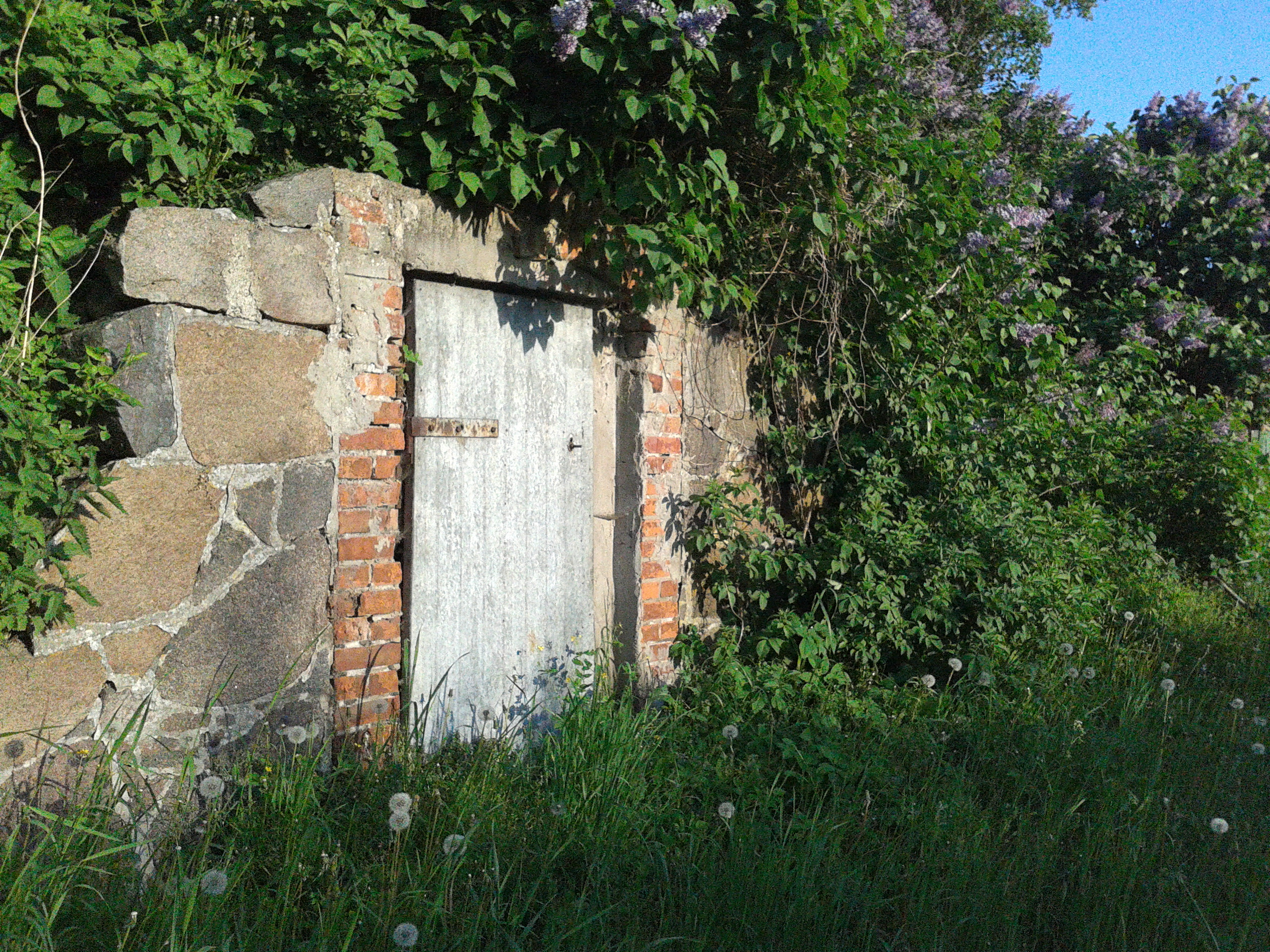 Piwnica w Daleszewie.